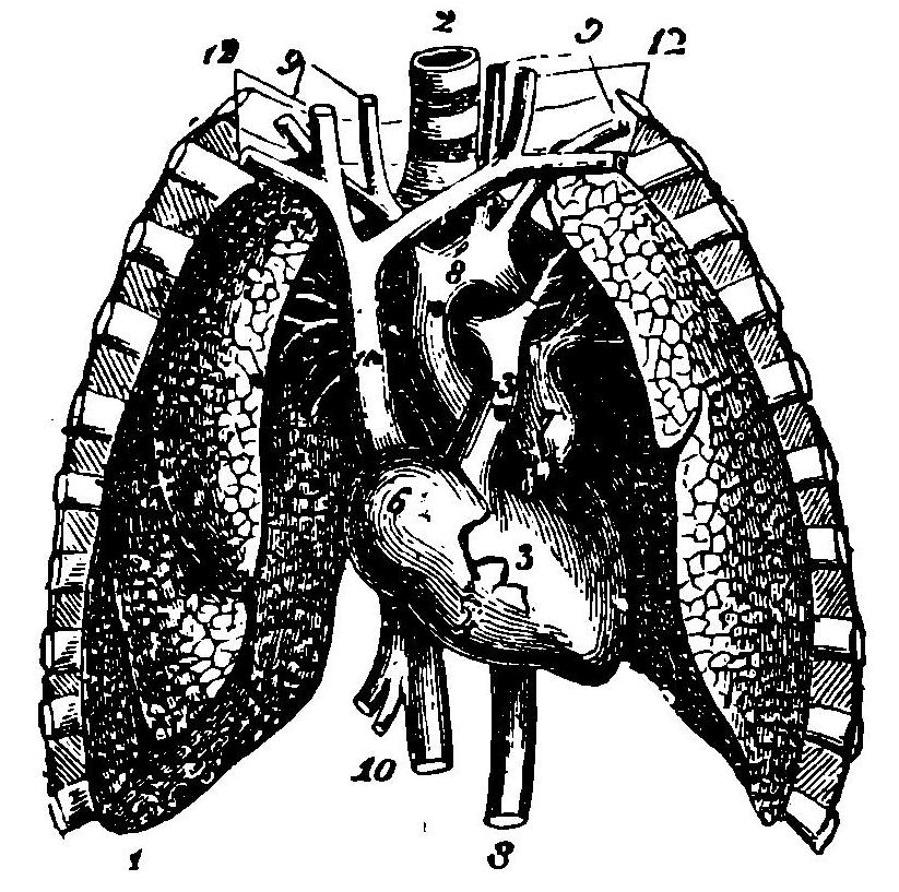 Corazón y pulmones en la cavidad torácica. - 1. Pulmón derecho - 2. Tráquea respiratoria - 3. Corazón - 4. Ventrículo derecho - 5. Ventrículo izquierdo - 6. Aurícula derecha - 7. Vena pulmonar - 8. Arteria aorta (cayado y aorta torácica) - 9. Arterias carótida y subclavia - 10. Vena cava inferior - 11. Vena cava superior - 12. Venas yugular y subclavia.